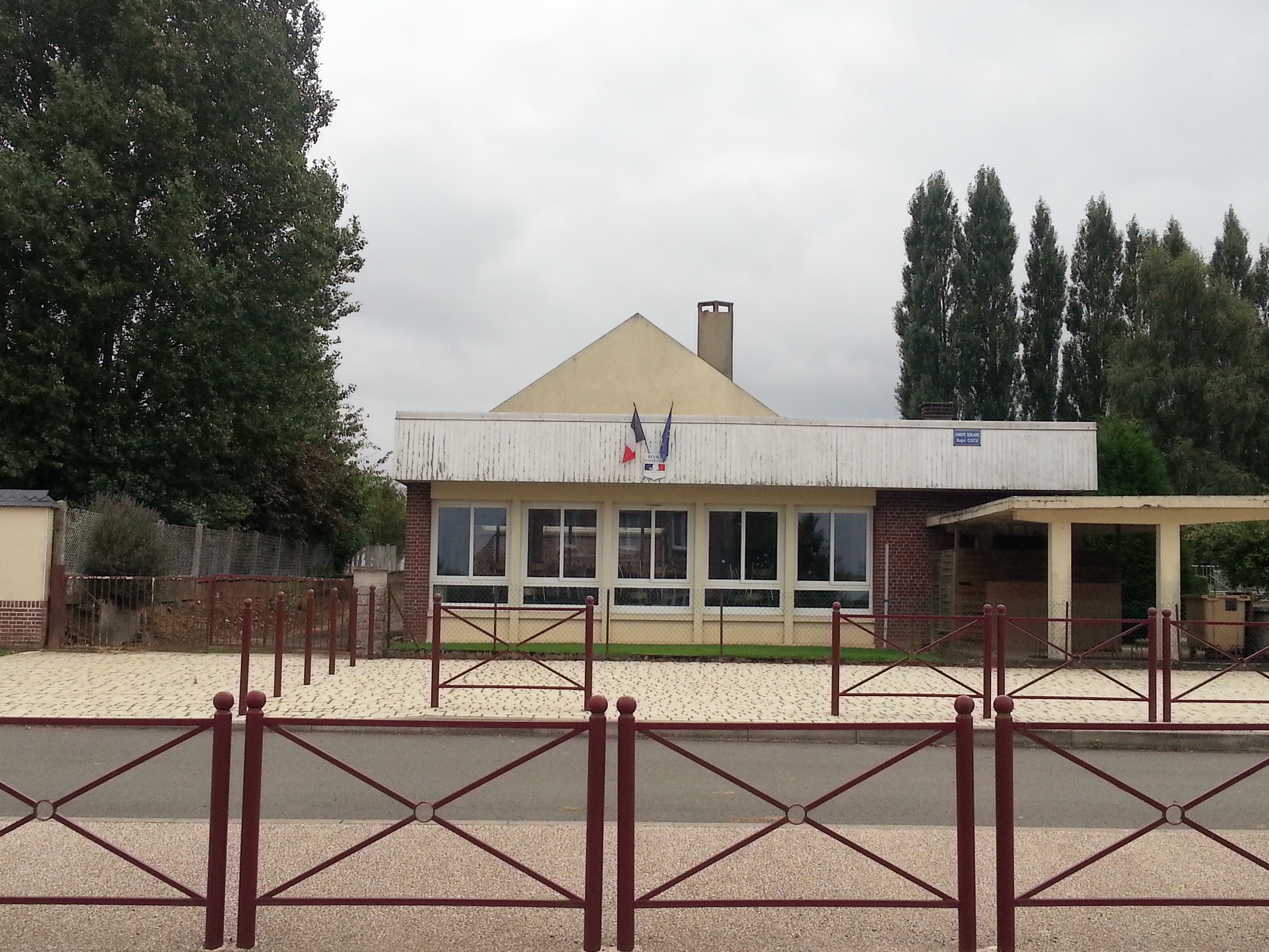 Le groupe scolaire Roger Cocu de Romescamps